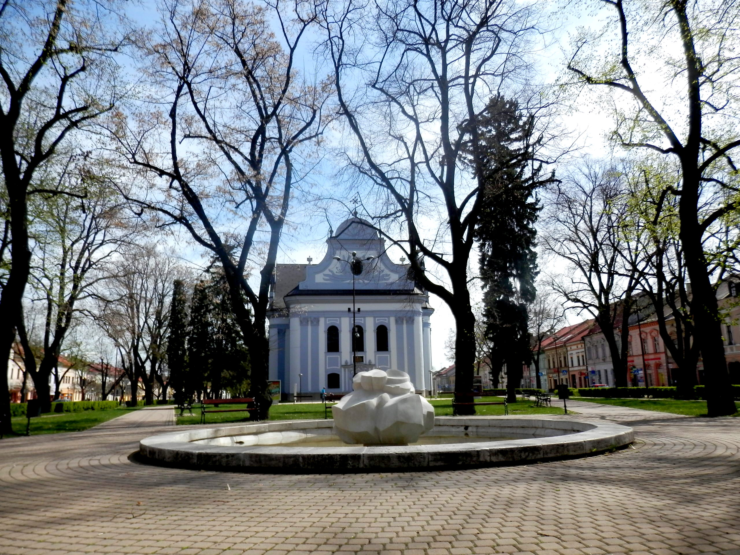 Evanjelický a. v. kostol (aj tolerančný) je vedený v zozname národných kultúrnych pamiatok SR. Prevládajúci sloh klasicizmus. Doba vzniku 1789-1796. Radničné námestie. Mesto Spišská Nová Ves.